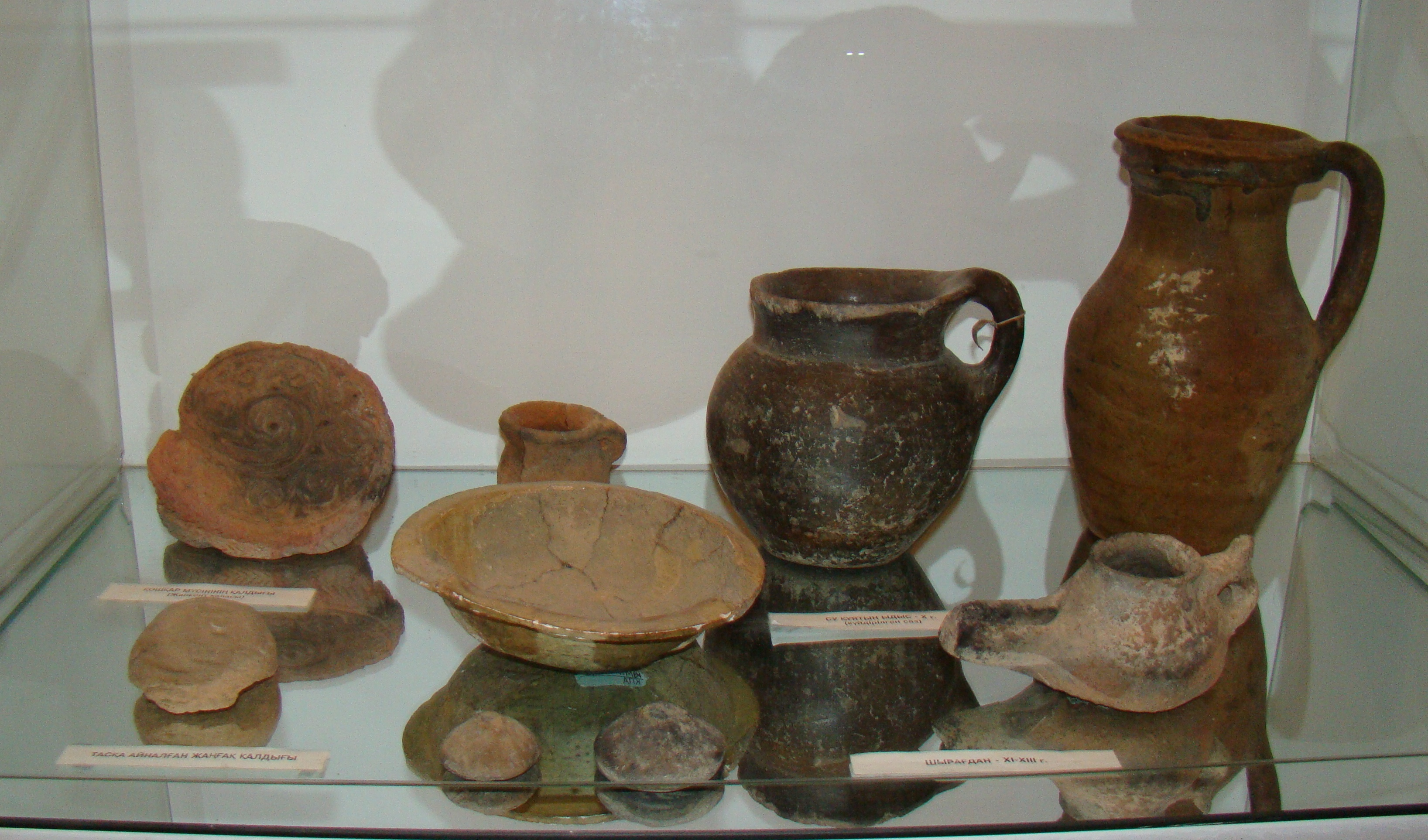 Музей меморала Коркут-Ата. Посуда с раскопок городища Янгикента.